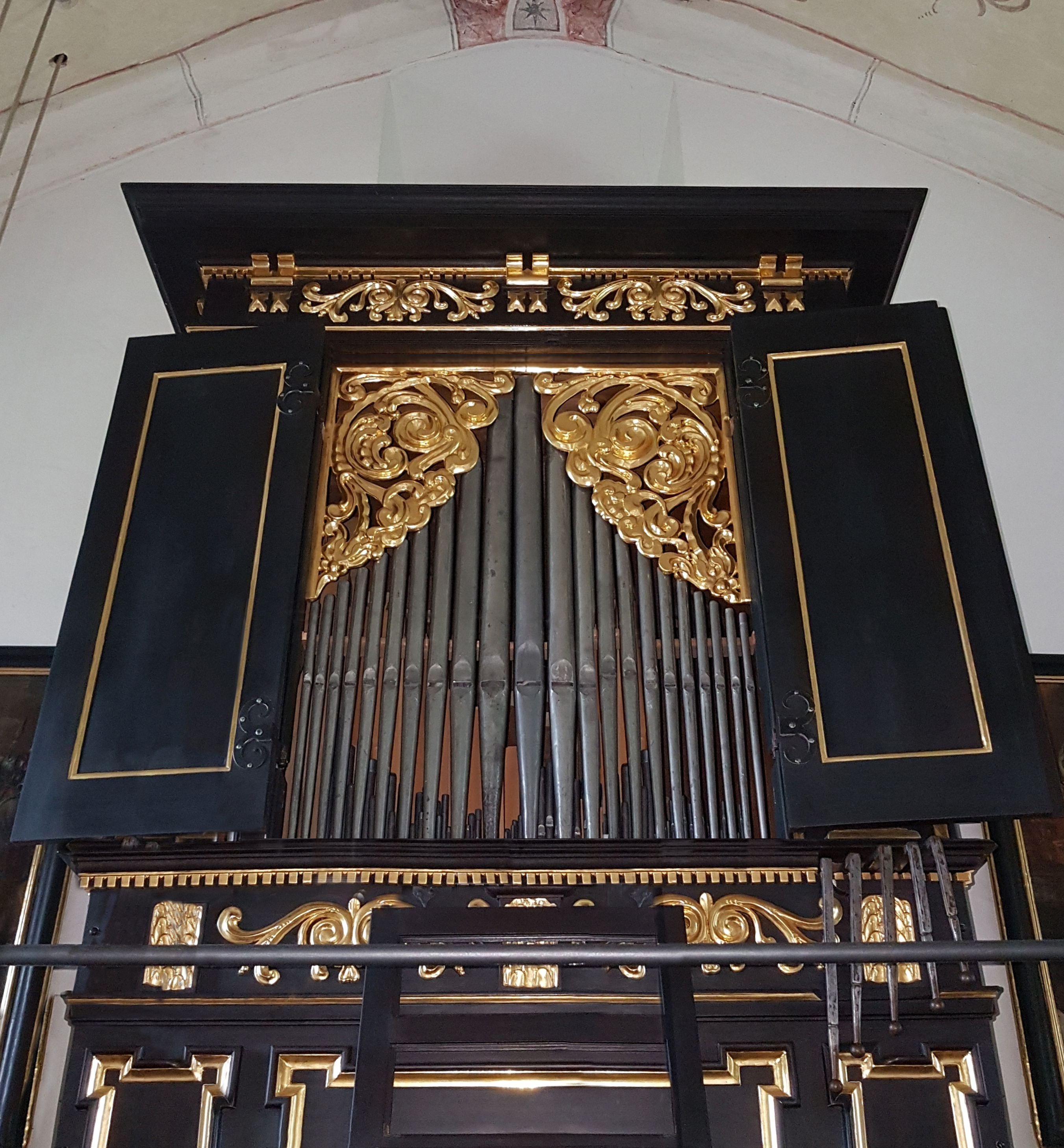 St. Vitus und Anna (Ettendorf)